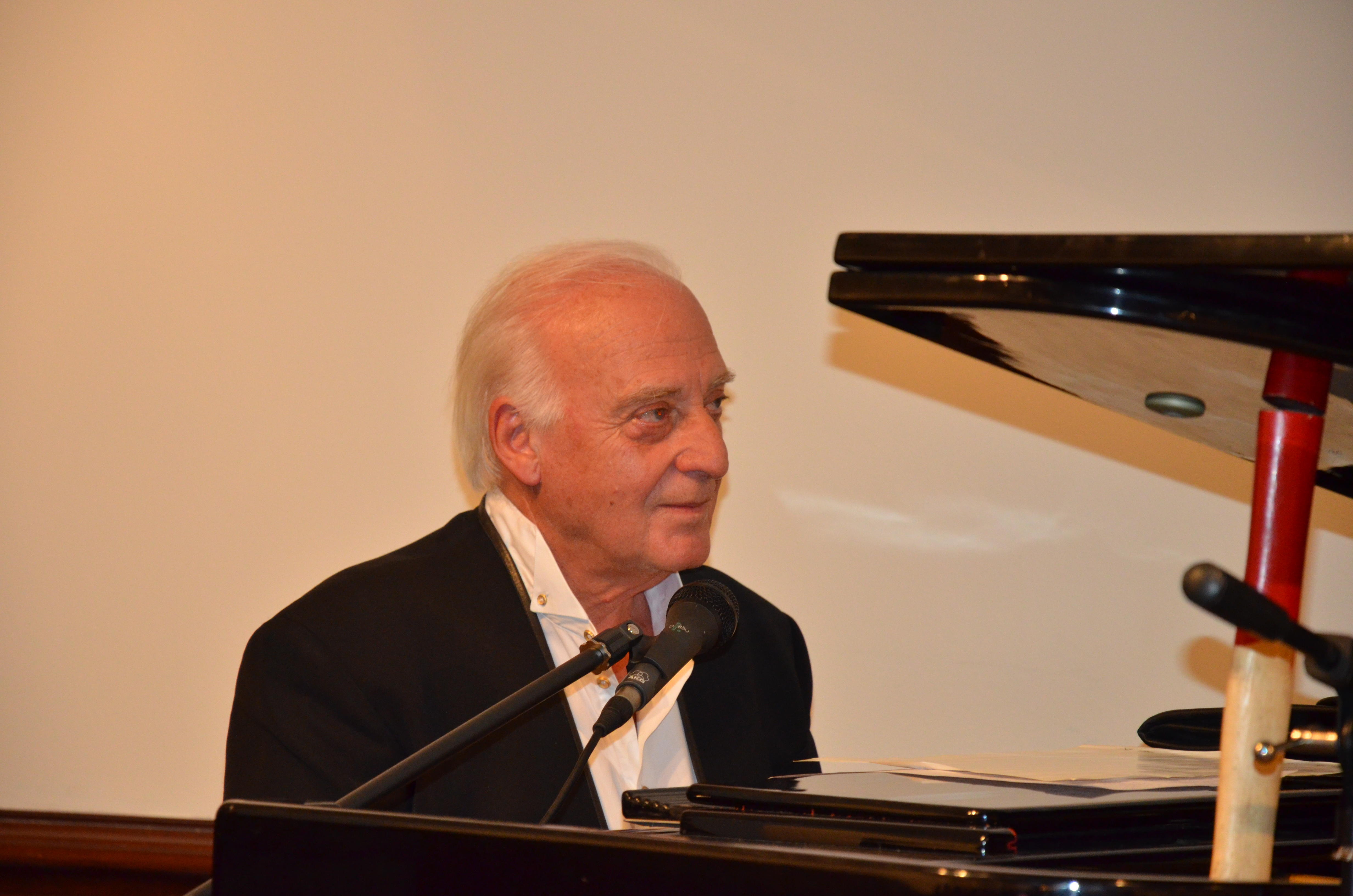 Συναυλία Γ. Χατζηνάσιου στο Σισμανόγλειο Μέγαρο στις 22 Σεπτεμβρίου 2012